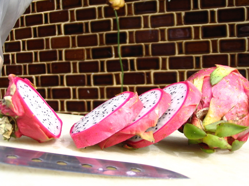 Pitaya slices